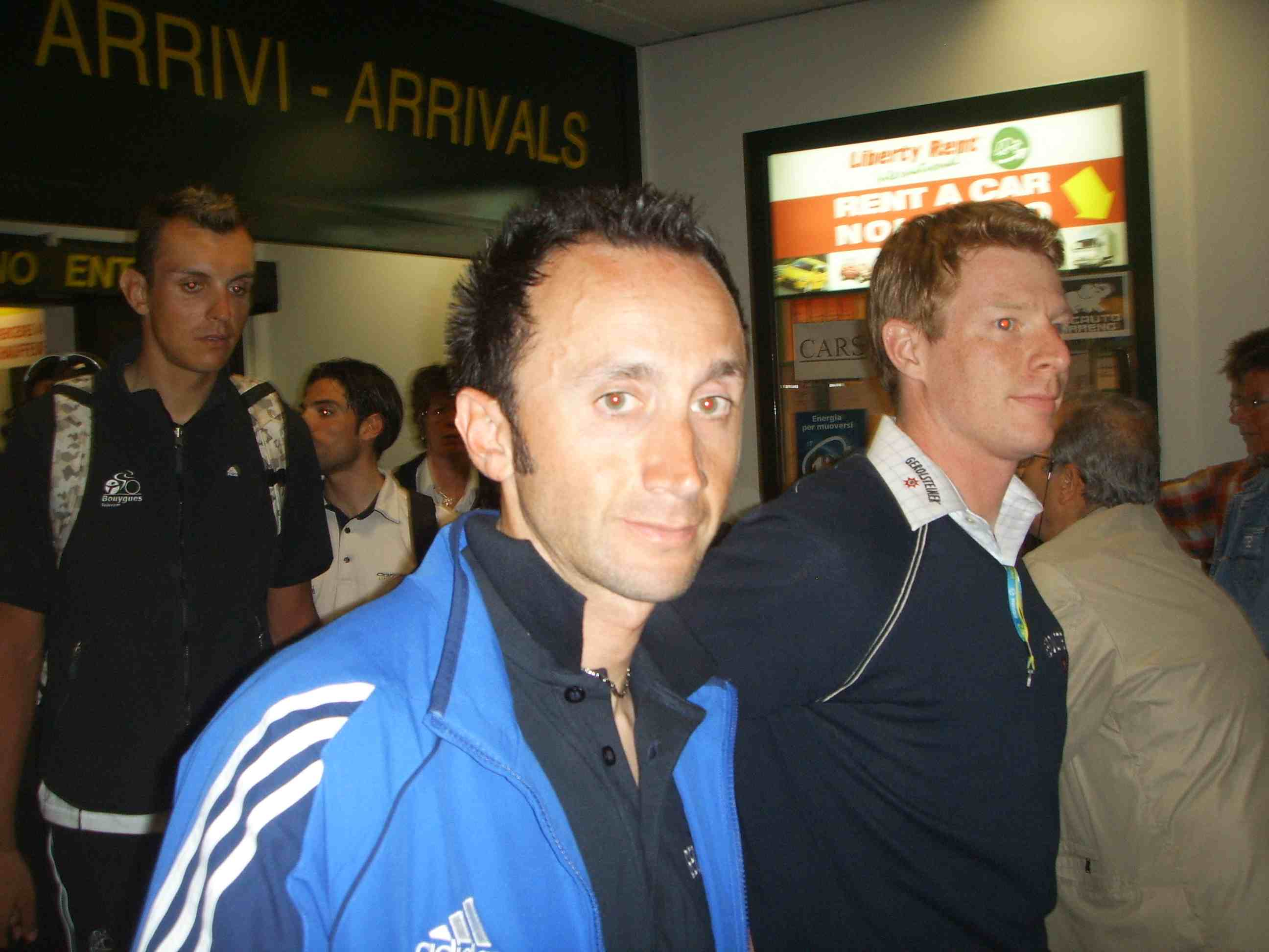 Davide Rebellin - Foto scattata da me (Pepp.cristiano 23:10, 18 giu 2006 (CEST), Giuseppe Cristiano) la rilascio nel pubblico dominio""